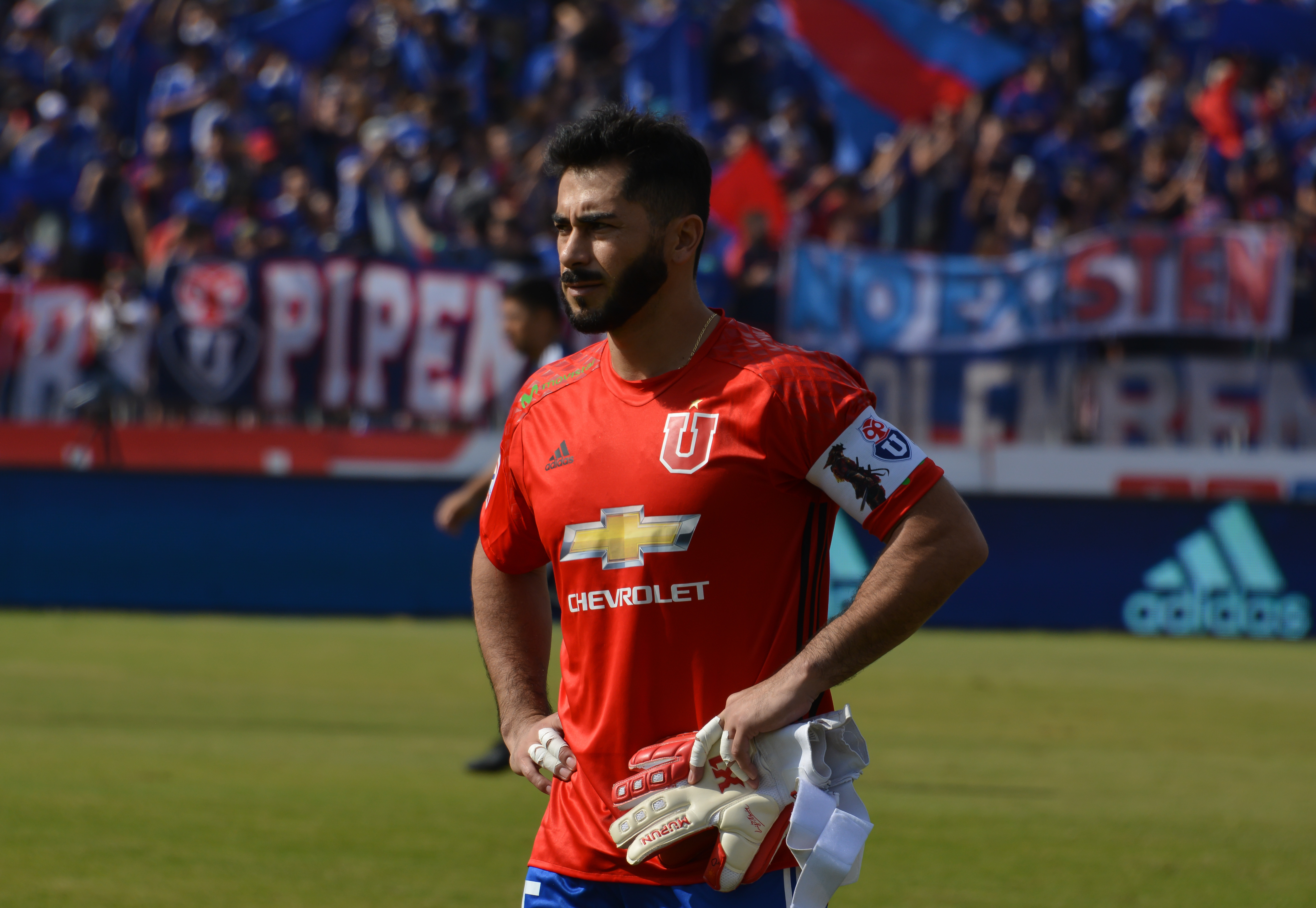 Johnny Herrera, Universidad de Chile v Colo-Colo, Estadio Nacional, Santiago, Chile.